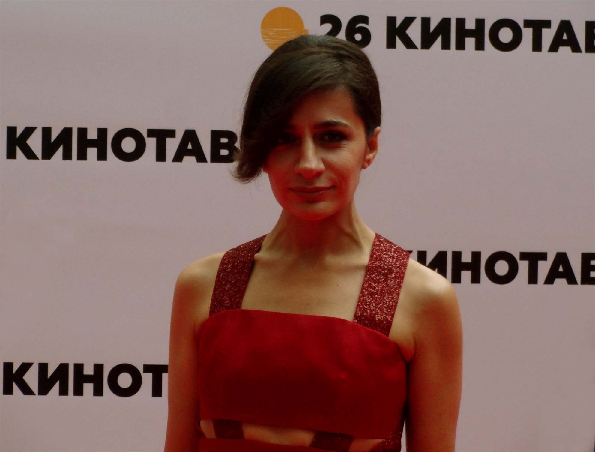 Анна Гагиковна Меликян (род. 1976) — российский кинорежиссёр, сценарист и продюсер. Сочи, 2015 год. 26-й фестиваль российского кино «Кинотавр»: триумфатором стал фильм Анны Меликян «Про любовь».